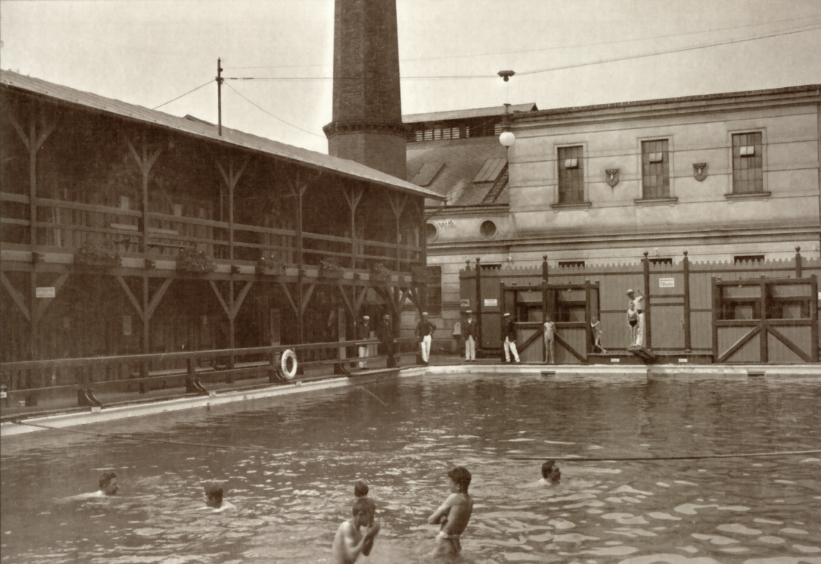 neueröffnetes Theresienbad (1902), Meidlinger Bezirksmuseum